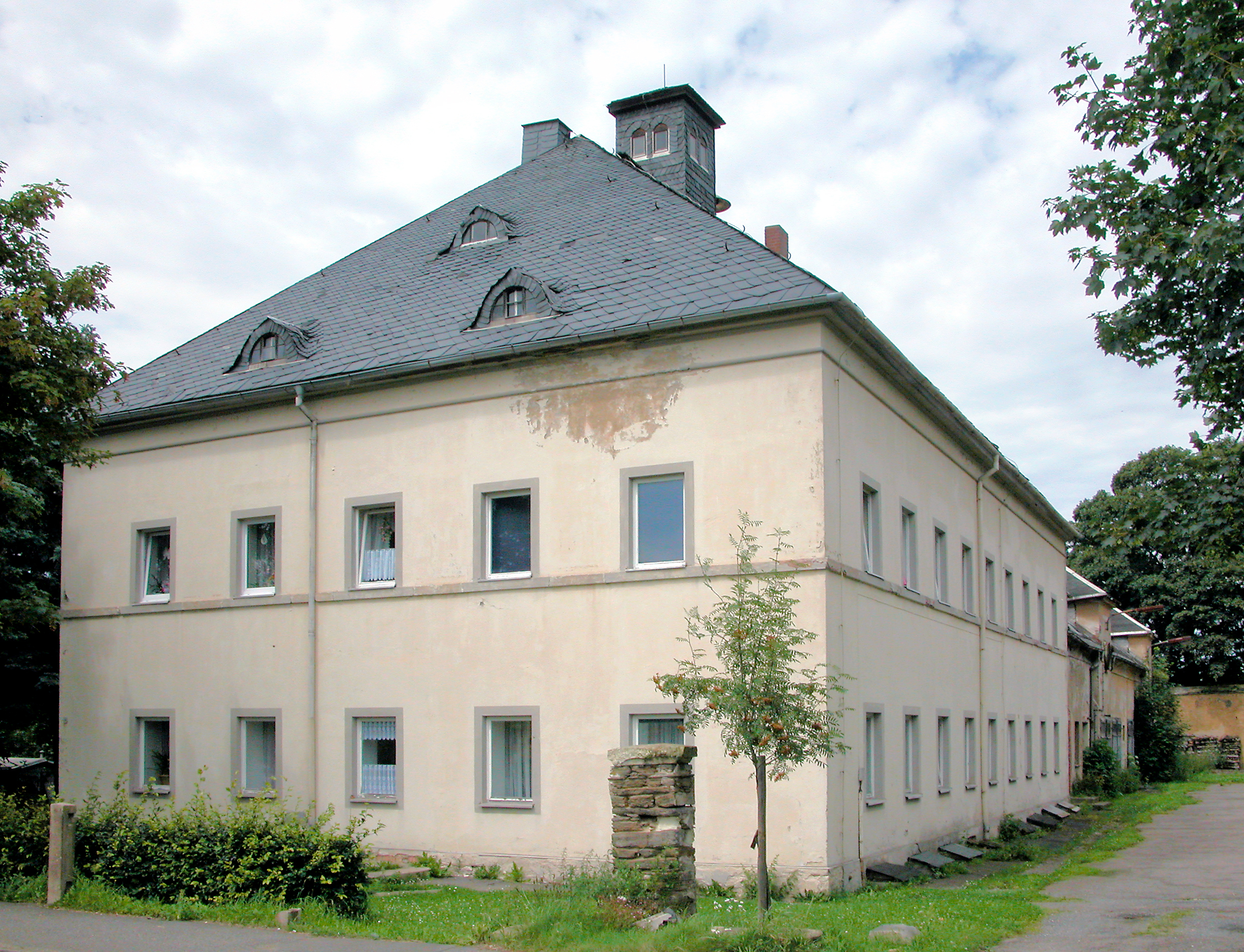 22.07.2009 09496 Heinzebank (zu Hilmersdorf Gemeinde Wolkenstein): An der Heinzebank 8 / Freiberger Straße (GMP: 50.681233,13.120863). Herrenhaus des ehem. Lehnguts Heinzebank, NO-Seite von der Straße aus gesehen. Nach dem Brand von 1848 ließ Johann Traugott Lutze das östlich vom Gasthofes gelegene, heute noch vorhandene Herrenhaus errichten. Nach 1887 wurde das Forstrevier Heinzebank gebildet und das Herrenhaus war der Wohn- und Amtssitz des Forstmeisters. Heute steht das Gebäude überwiegend leer. [DSCN38296.TIF]20090722400DR.JPG(c)Blobelt